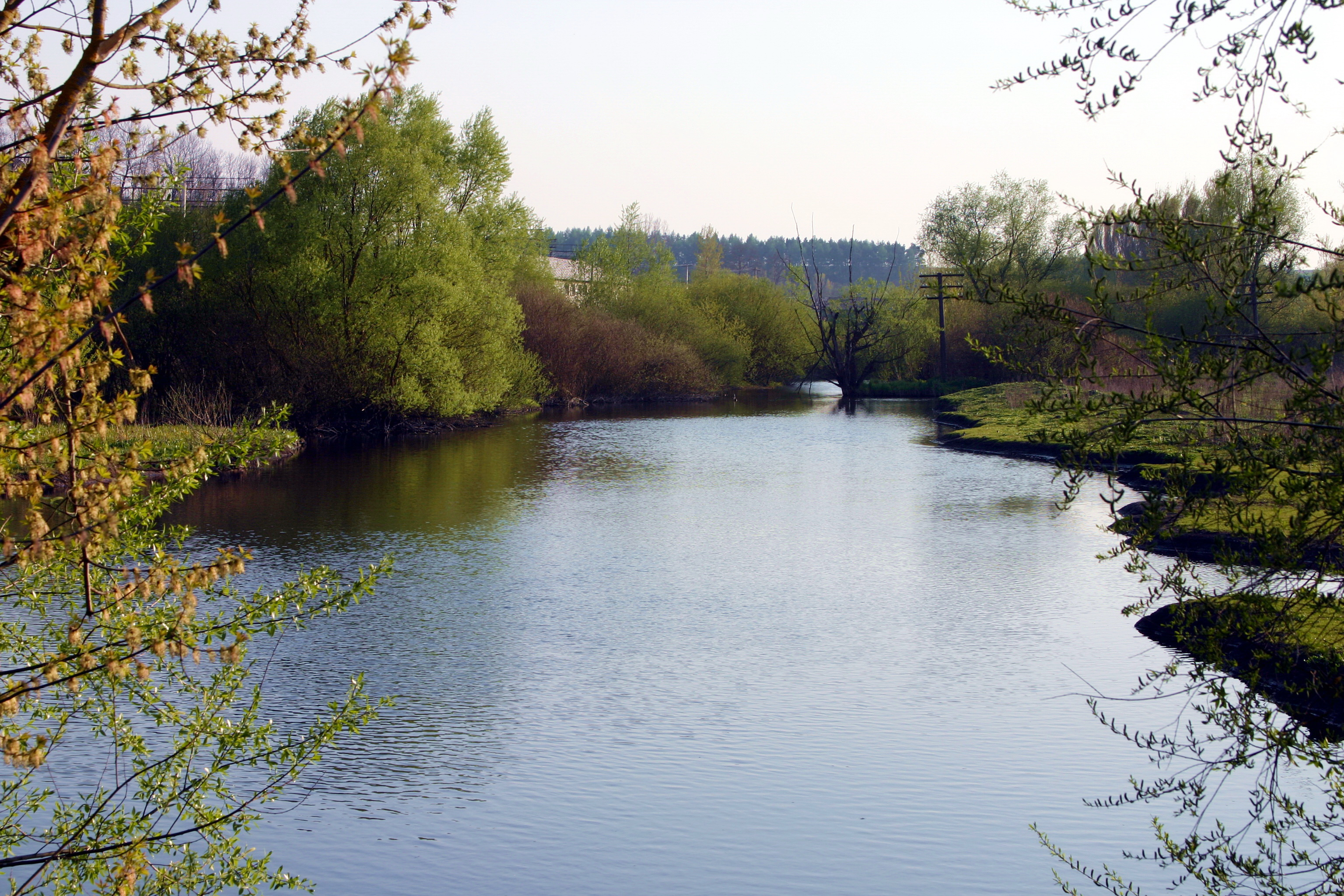 Гирло р. Теребної.